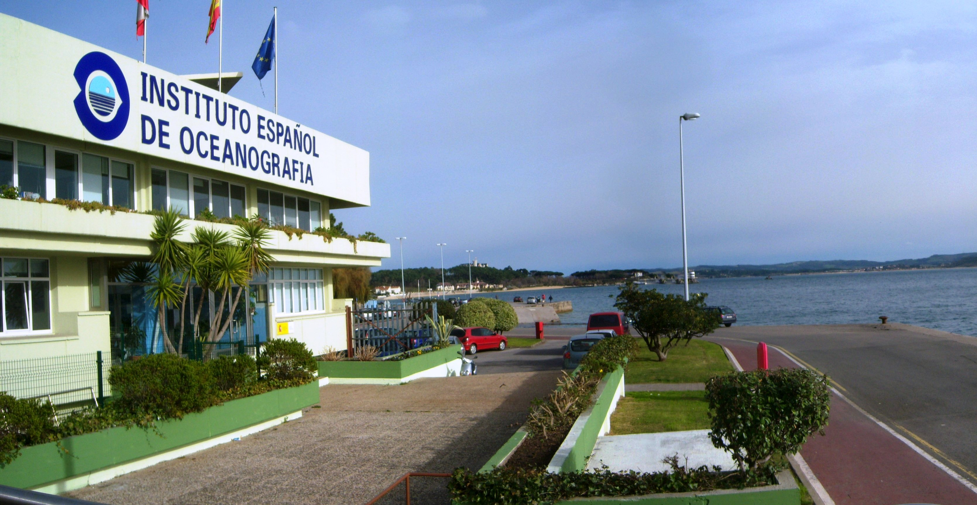 Instituto Español de Oceanografía, en Santander (Cantabria, España)